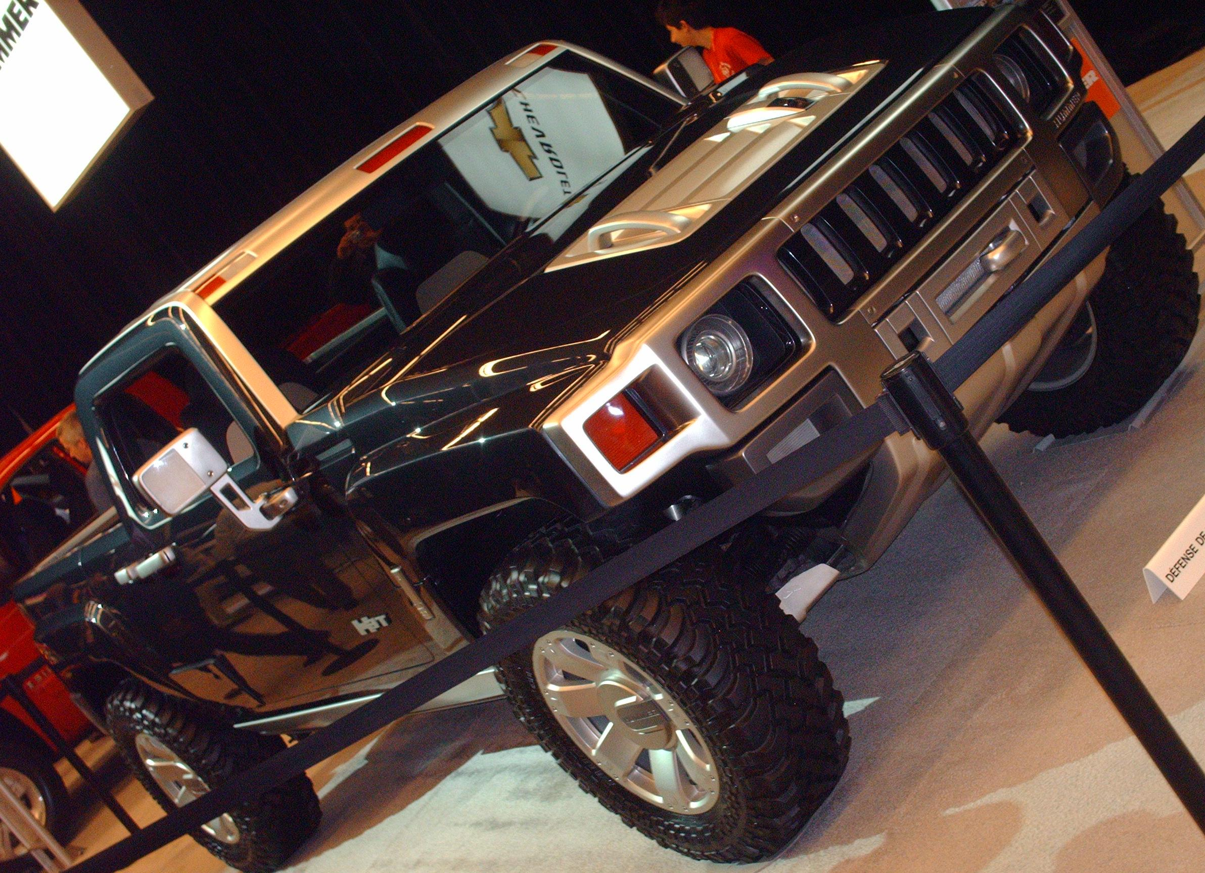 Hummer H3t concept photographed at le Salon International de l'auto de Montréal 2007.